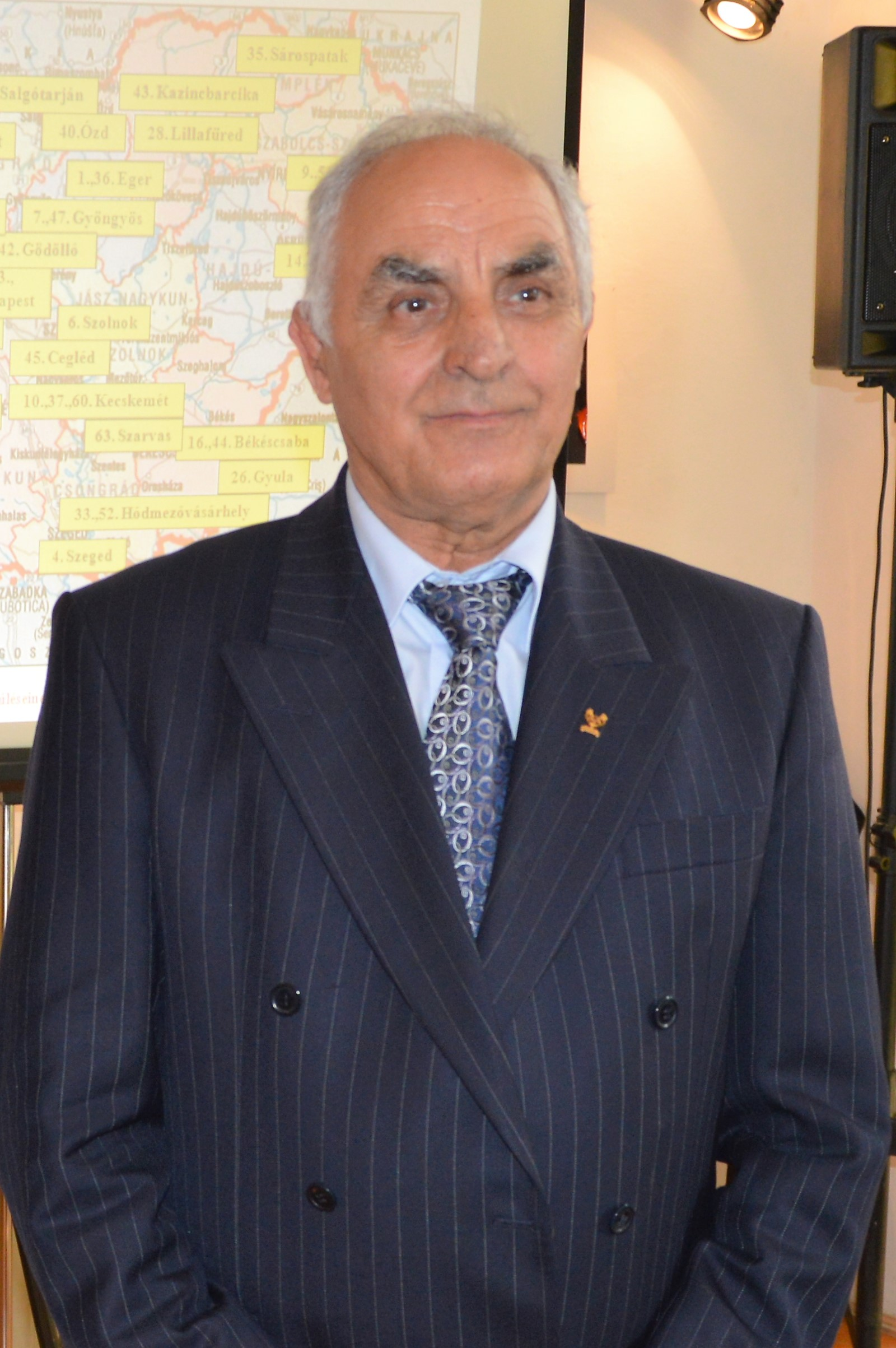 Varga János olimpiai bajnok birkózó, edző